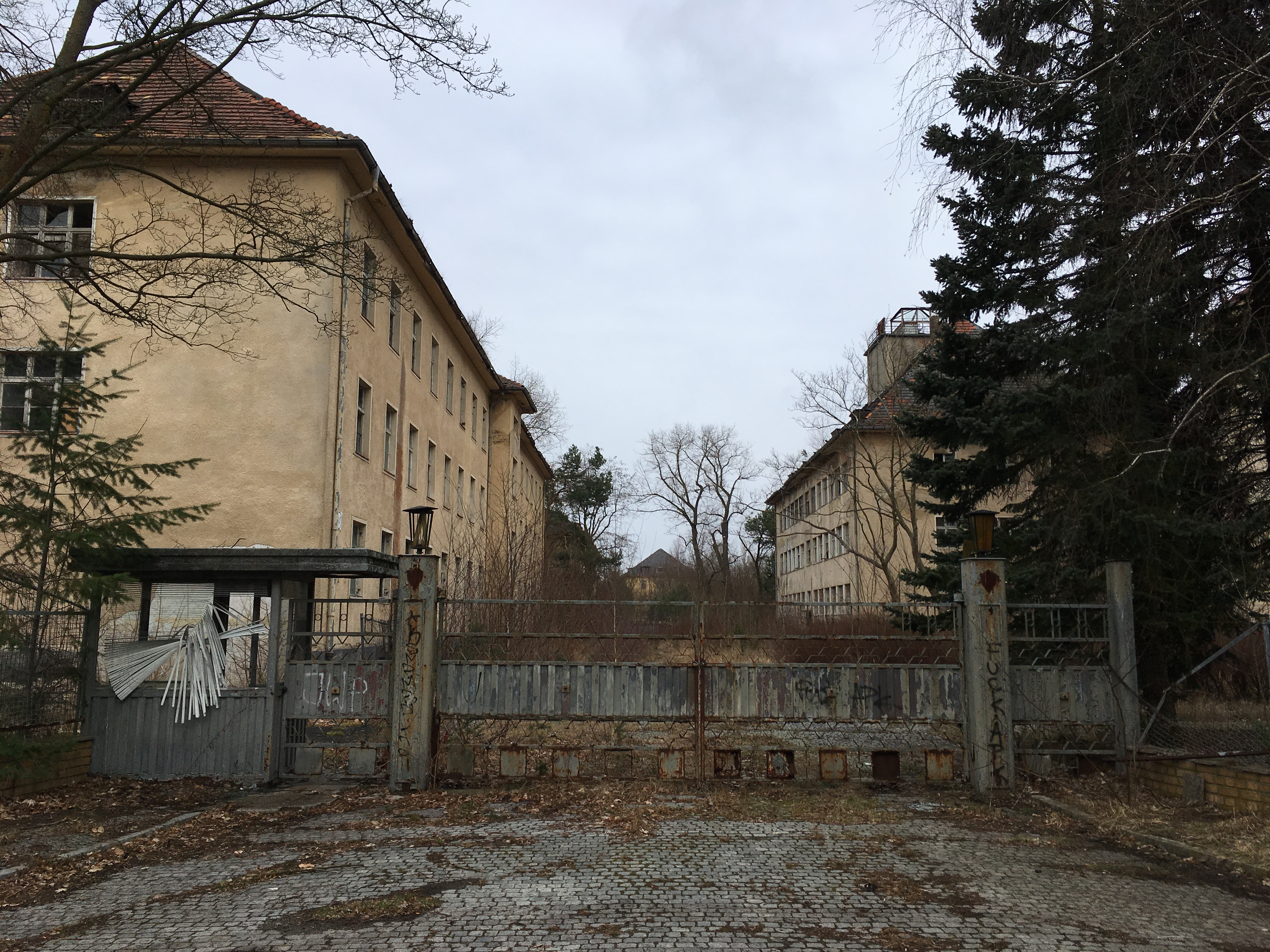 Der Historischer Rundweg durch die Verbotene Stadt ist ein rund 11 km langer Rundweg in Zossen. Er erschließt die Waldstadt, in der 1910 ein Kaiserlicher Truppenübungsplatz entstand. Er wurde 1935 vom Oberkommando des Heeres und ab 1945 von der Gruppe der Sowjetischen Streitkräfte in Deutschland genutzt.